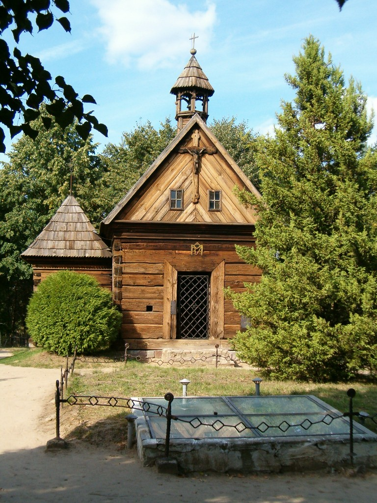 Kaplica z 1765 z okolic Otłoczyna, budowla o konstrukcji zrębowej, przykryta dachem dwuspadowym. Obecnie znajduje się w Wielkopolskim Parku Etnograficznym w Dziekanowicach.